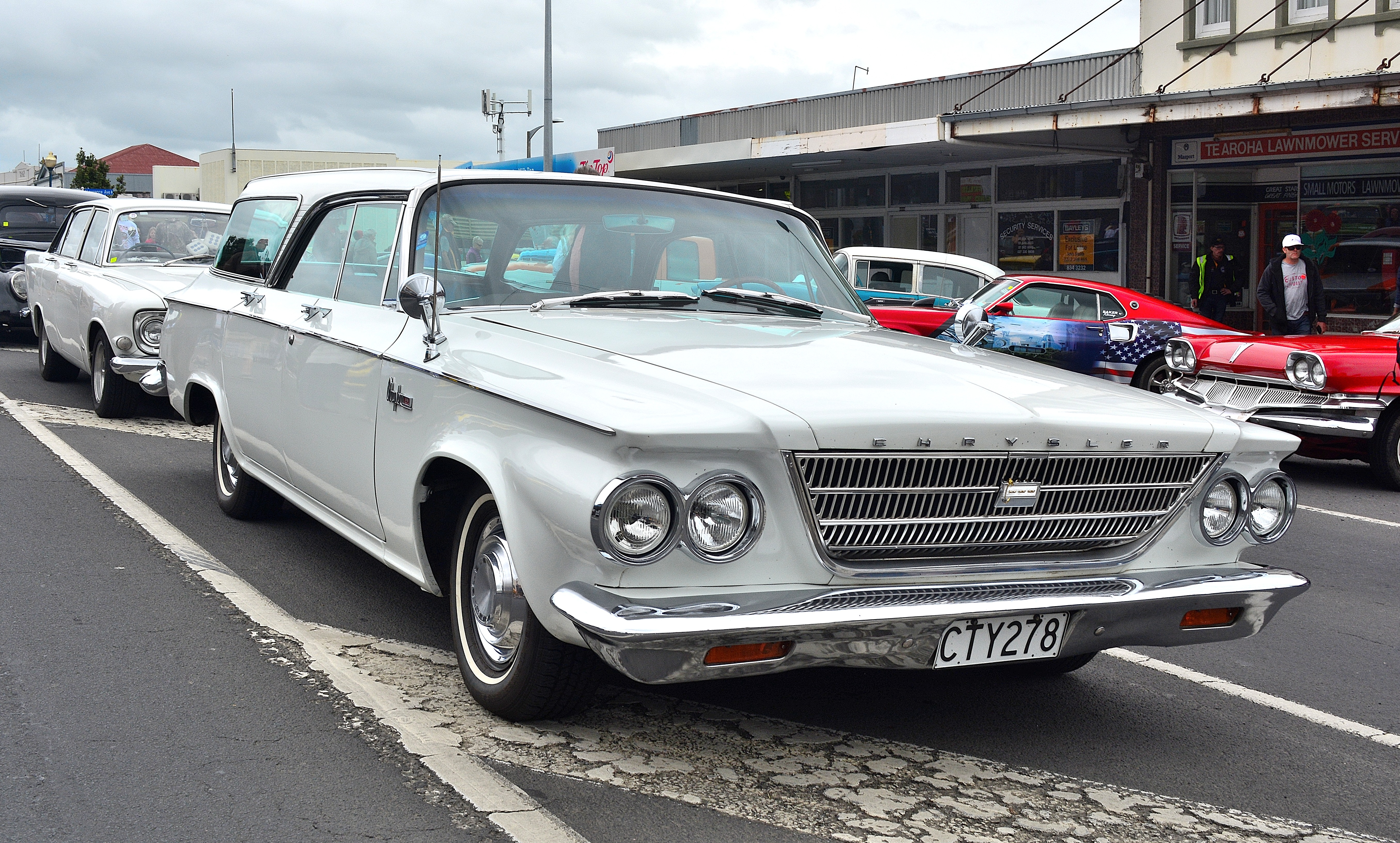 Te Aroha,Waikato,New Zealand